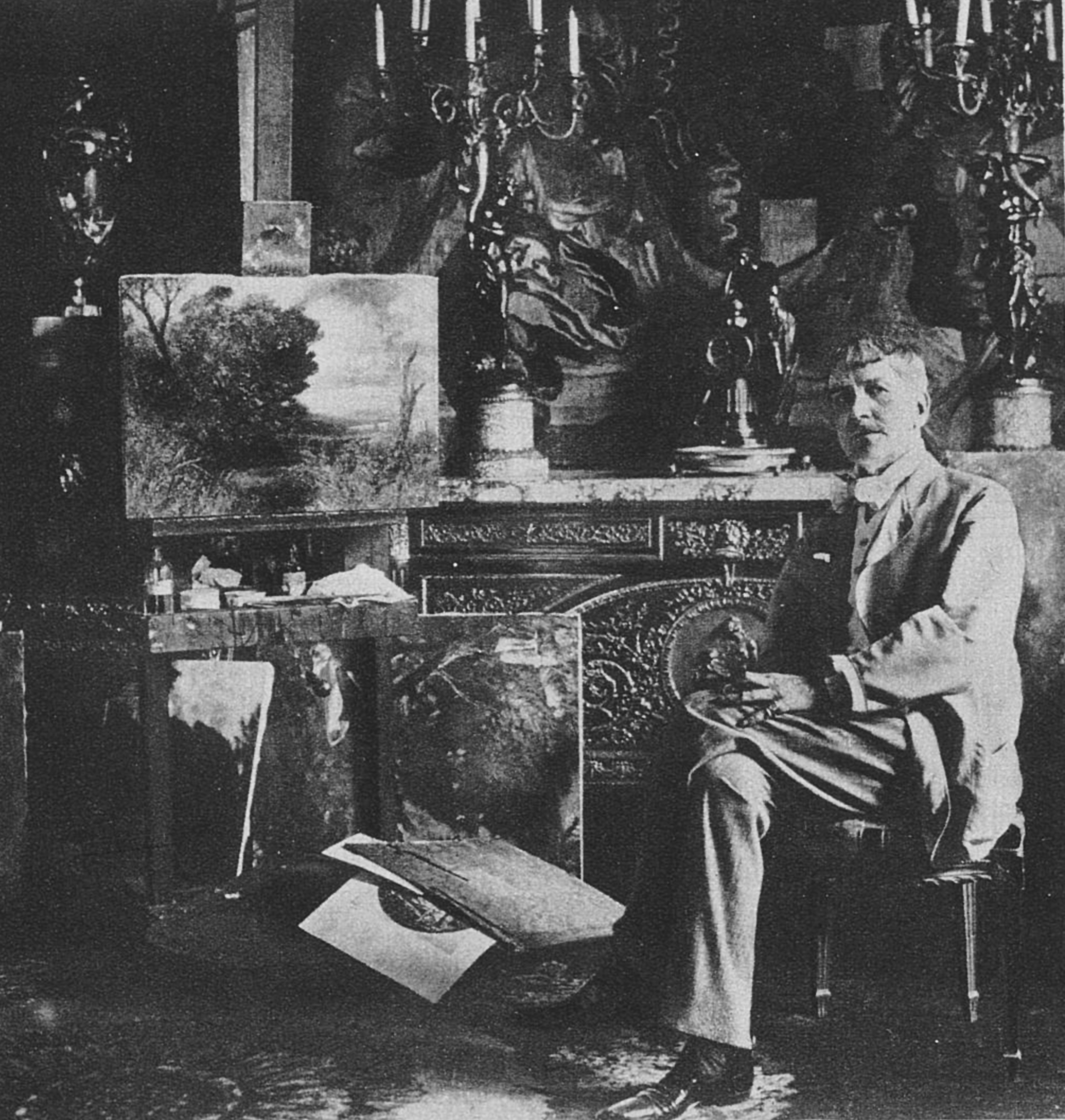 Zum 60. Geburtstag des Malers und Radierers Friedrich von Schennis (geb. 17. Juli 1854 in Elberfeld) Der Künstler in seinem Berliner Atelier (1914)